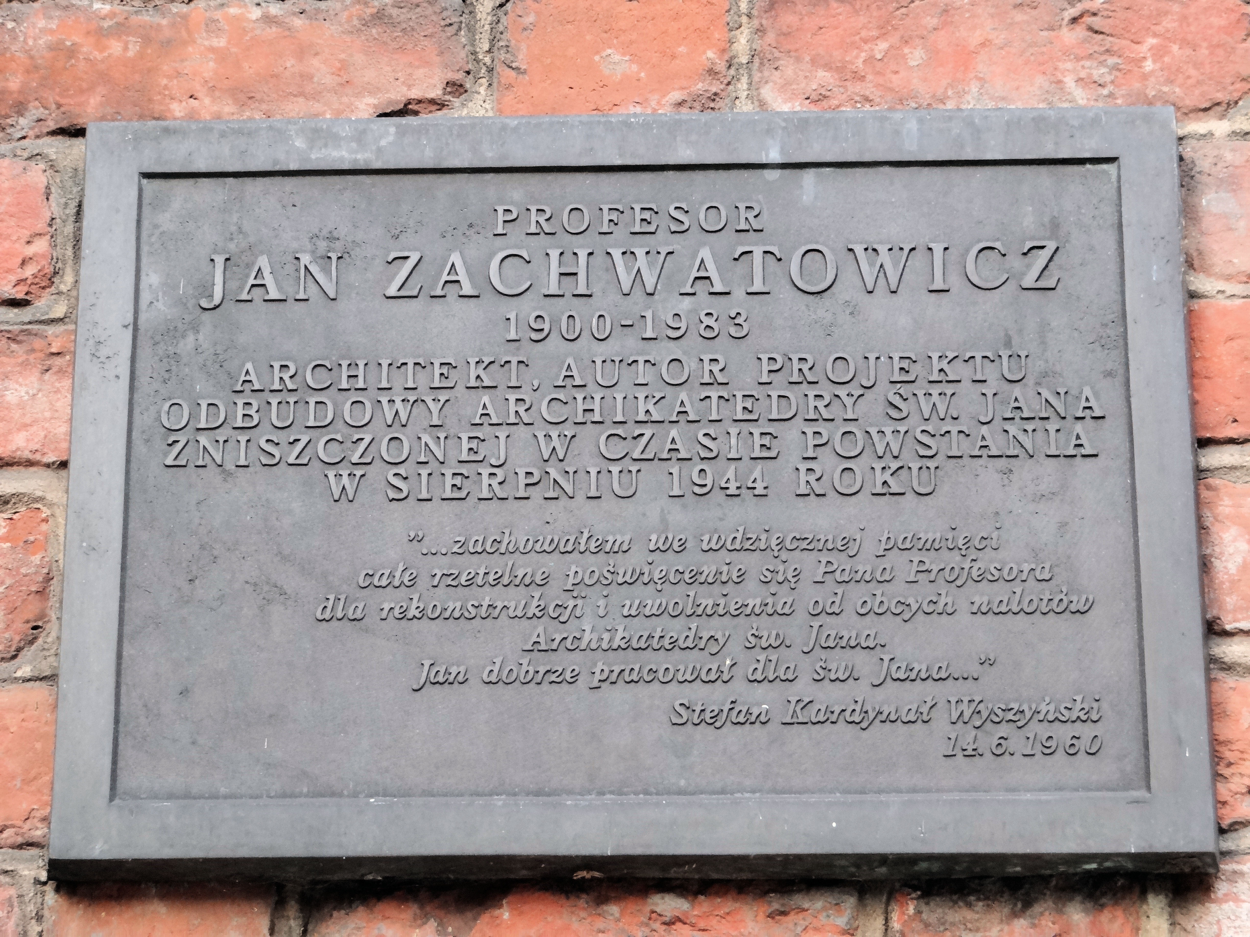 Pamiątkowa tablica poświęcona profesorowi Janowi Zachwatowiczowi upamiętniająca jego pieczę nad odbudową Archikatedry św Jana po zniszczeniach wojennych - z cytatem Stefana Wyszyńskiego Kardynała, Prymasa Polski " ... zachowałem we wdzięcznej pamięci całe rzetelne poświęcenie się Pana Profesora dla rekonstrukcji i uwolnienia od obcych nalotów Archikatedry św Jana. Jan dobrze pracował dla św Jana..."